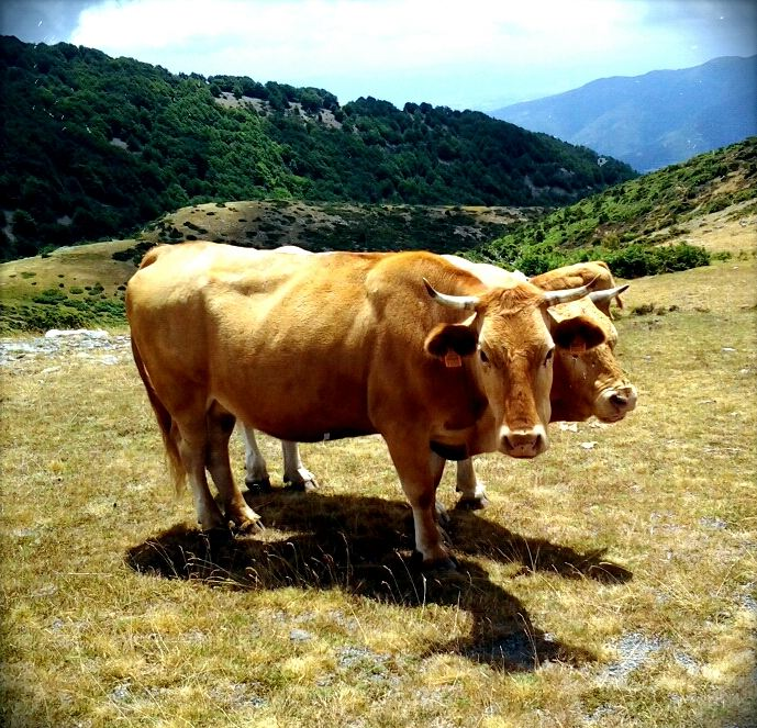 Vaques pasturant sota el Matagalls un magnífic diumenge dia 15 de juliol de 2012 a les dues de la tarda.